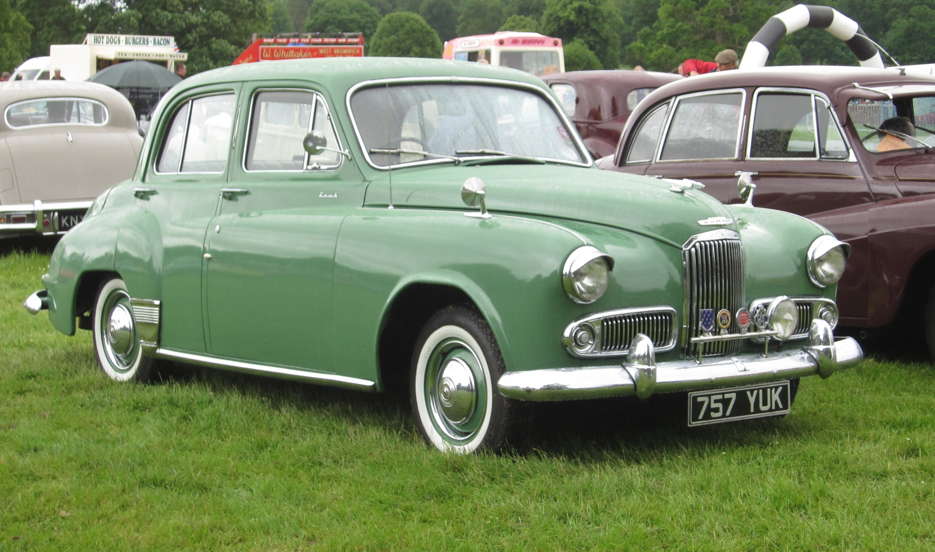 Humber Hawk (1954)